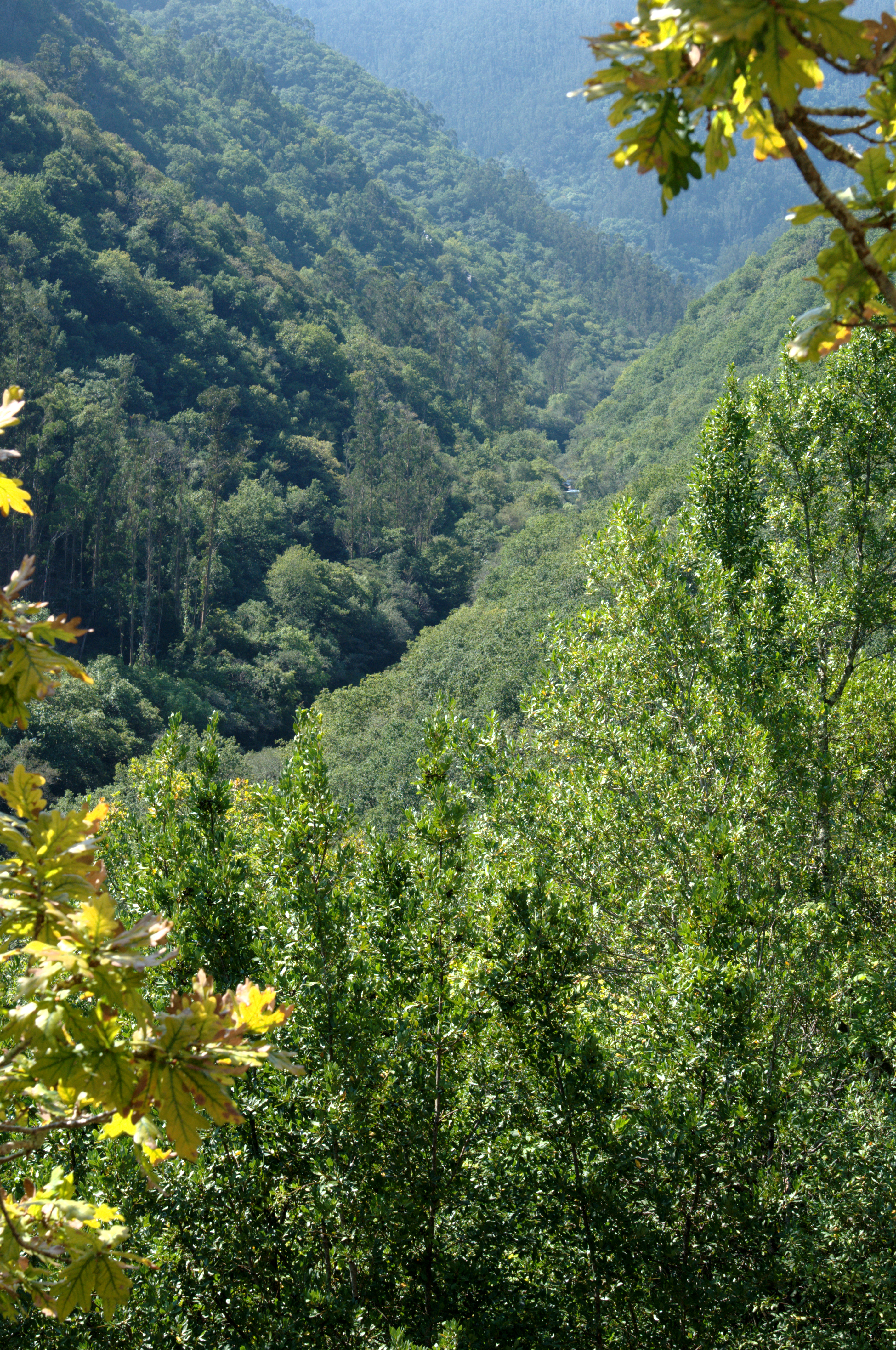 Parque Natural Fragas del Eume